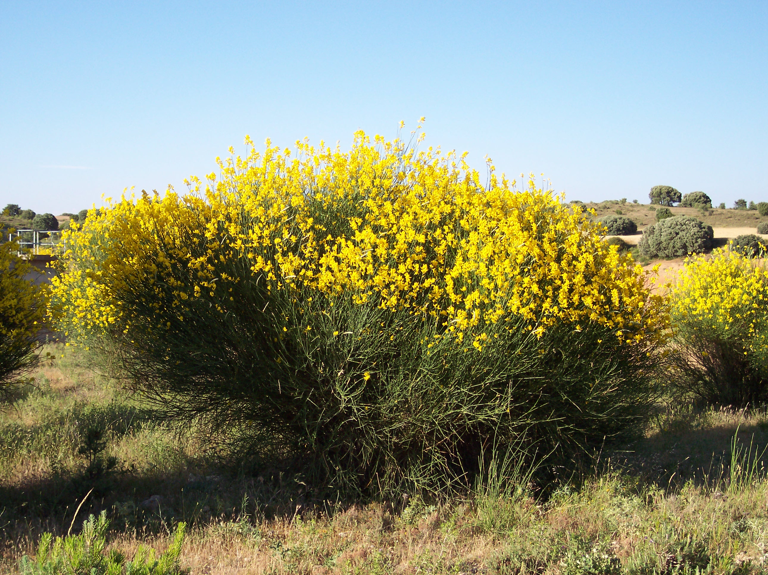 Spartium junceum. Olivares de Júcar, Cuenca, España